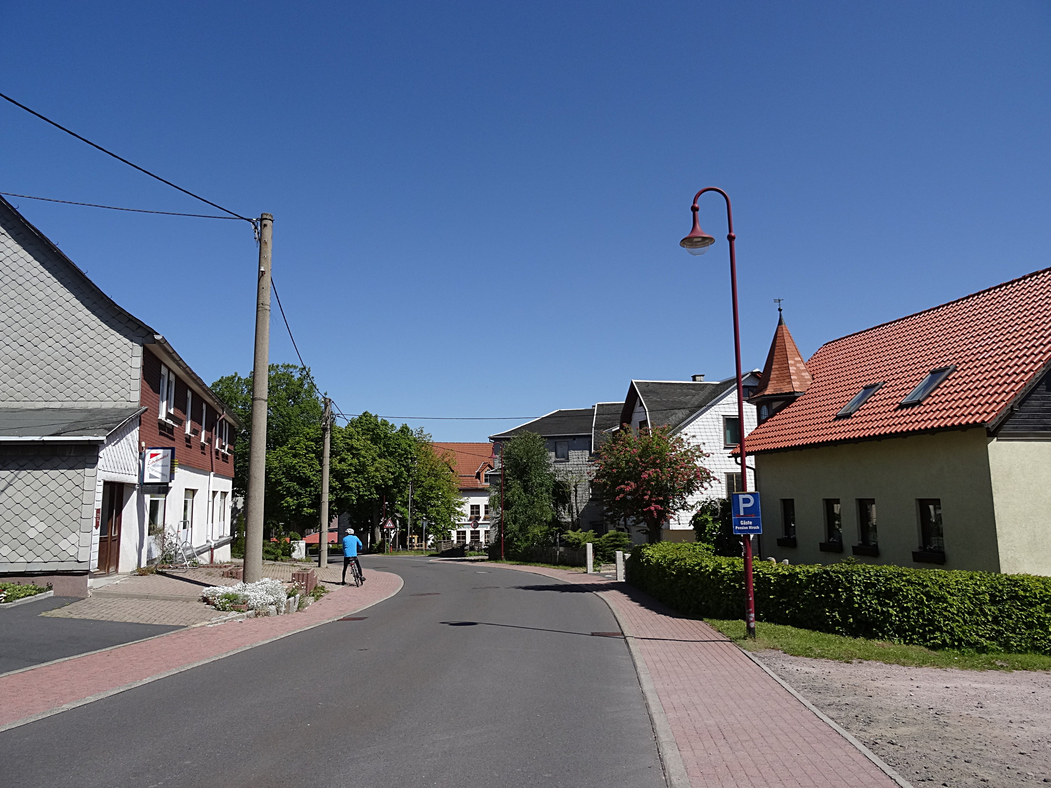 Hauptstraße in Gehlberg